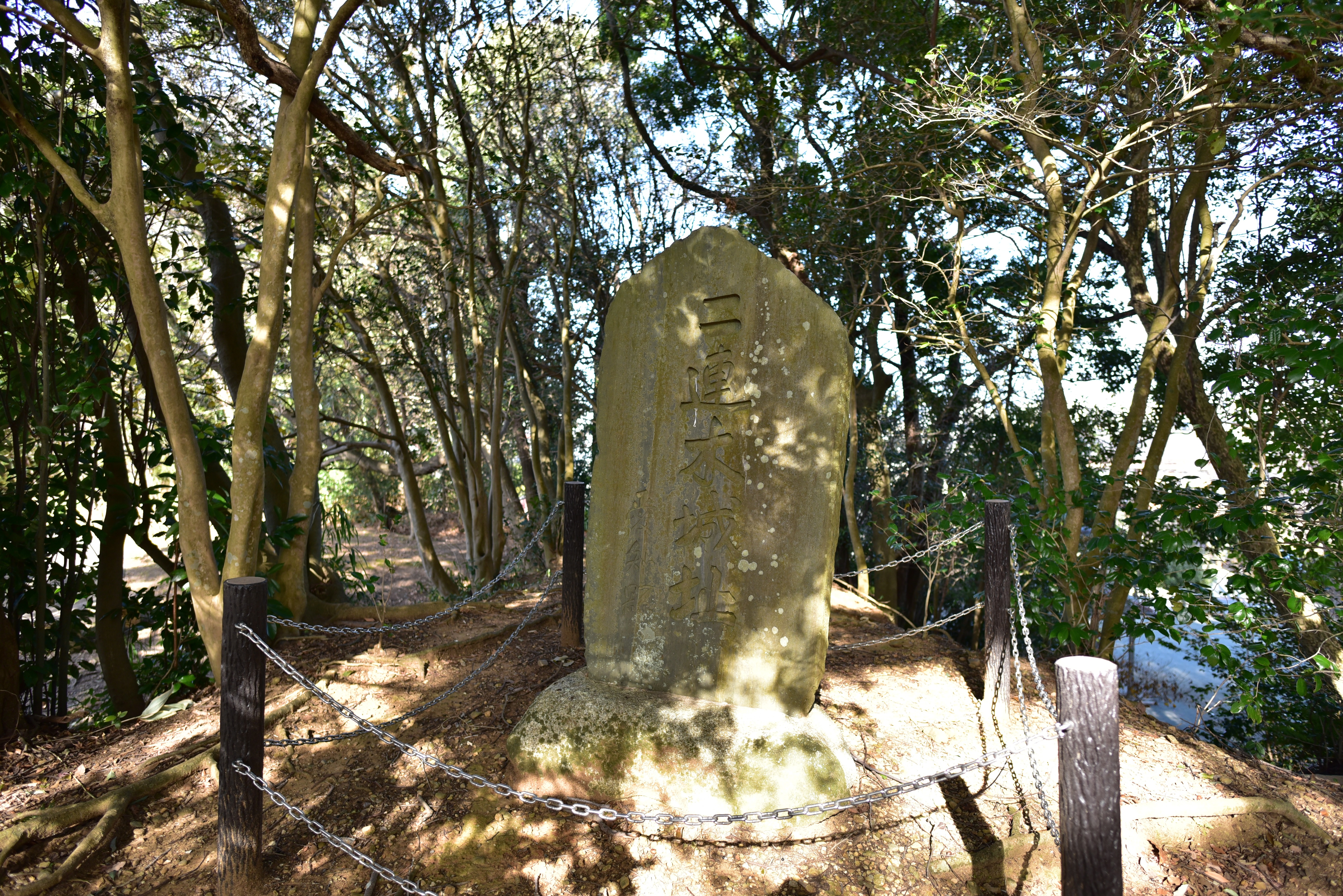 二連木城址の碑